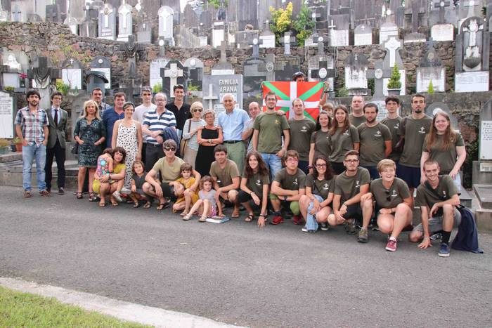 2018an Donostiako Polloeko hilerrian egindako omenaldia